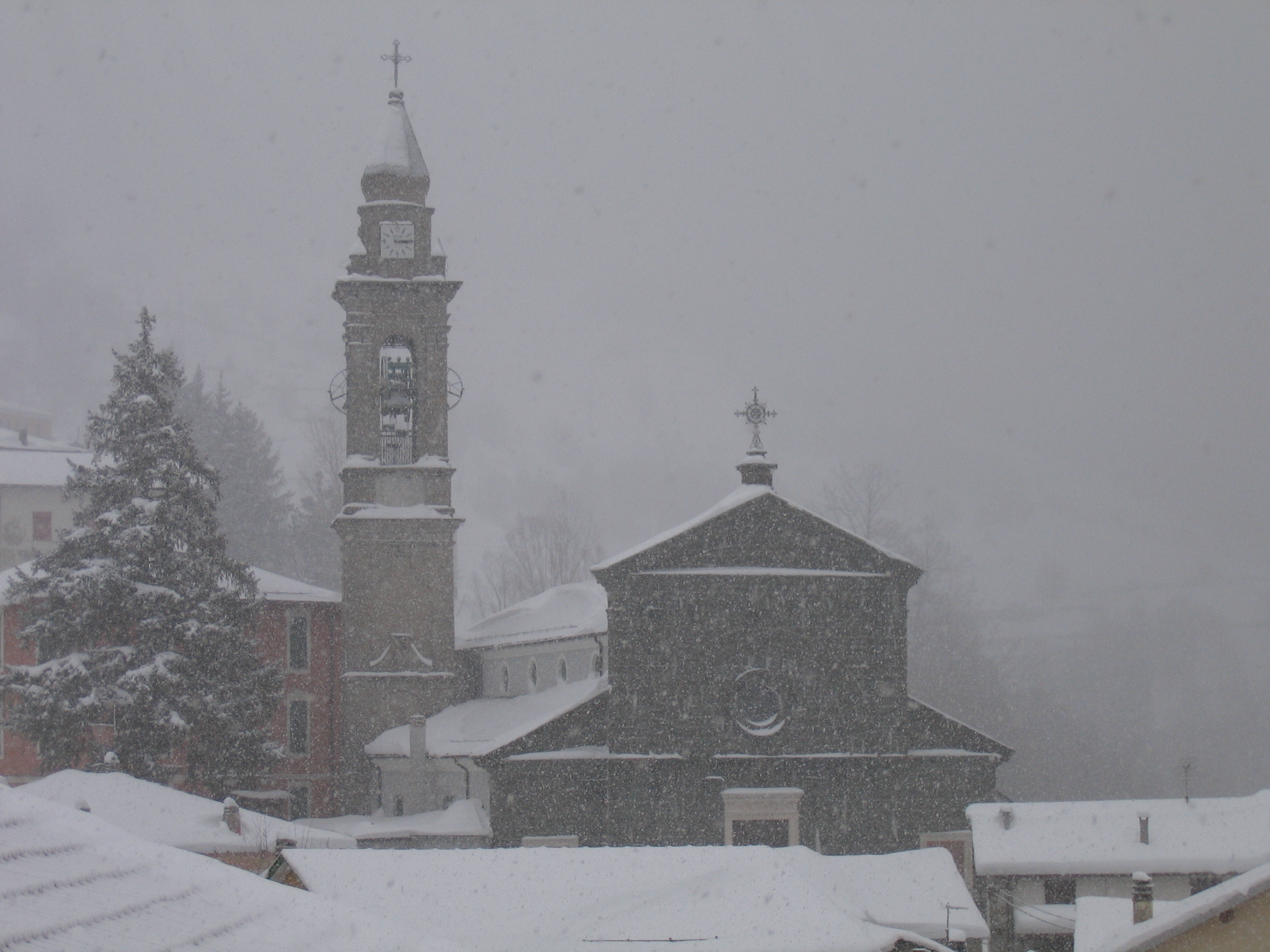 Foto: Immagine Chiesa San Michele Arcangelo di Alpicella d'Aveto mentre nevica Autore: Franco Luigi Mazza Proprietà: Franco Luigi Mazza